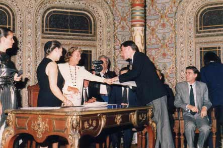 Eliane Richepin à Porto en 1986